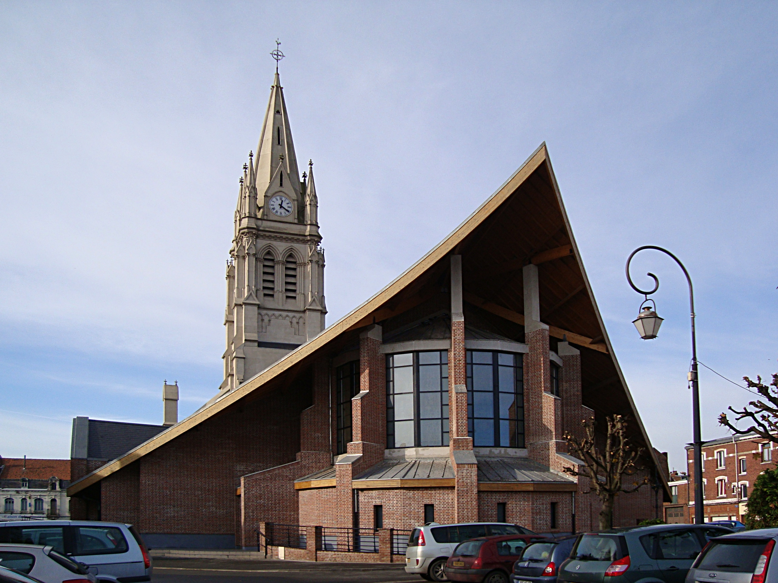 Vue arrière de l'église Saint-Vaast de La Bassée (Nord). Construite dans les années 1920, l'église a été démolie en 2003 à l'exception du clocher et reconstruite en 2005.